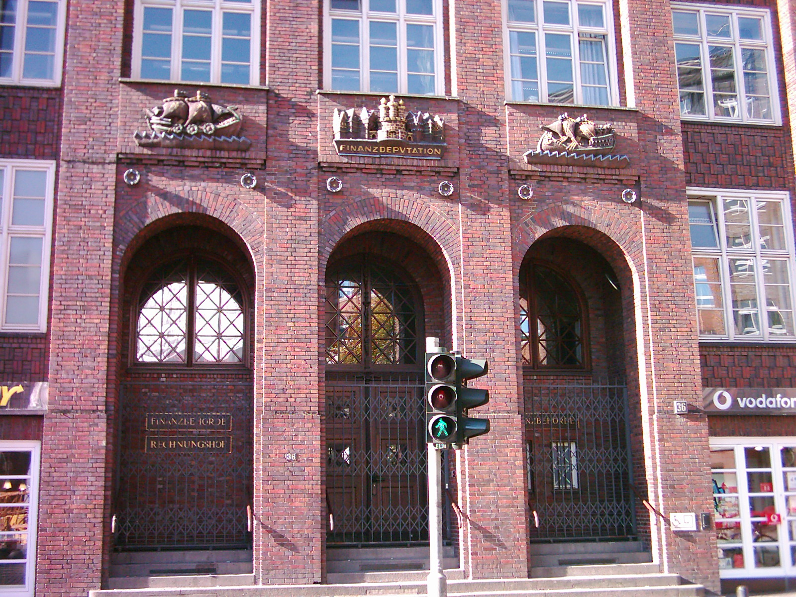 Eingang der Finanzbehörde Hamburg am Gänsemarkt. This is a photograph of an architectural monument.